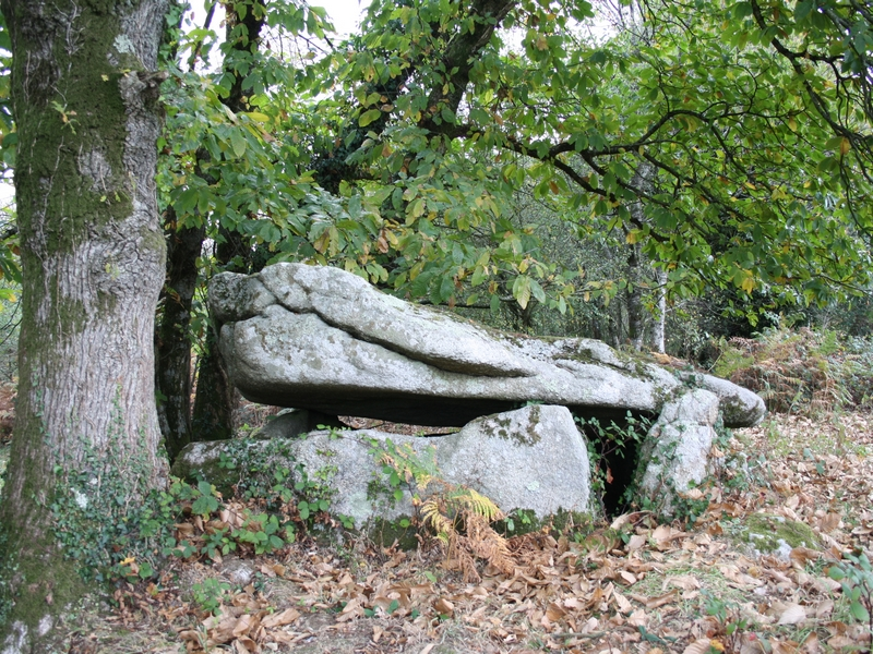 Egalement nommé "En-er-huennou d'Endiass", ce dolmen est situé à environ 500 mètres des vestiges du château de Guidfosse